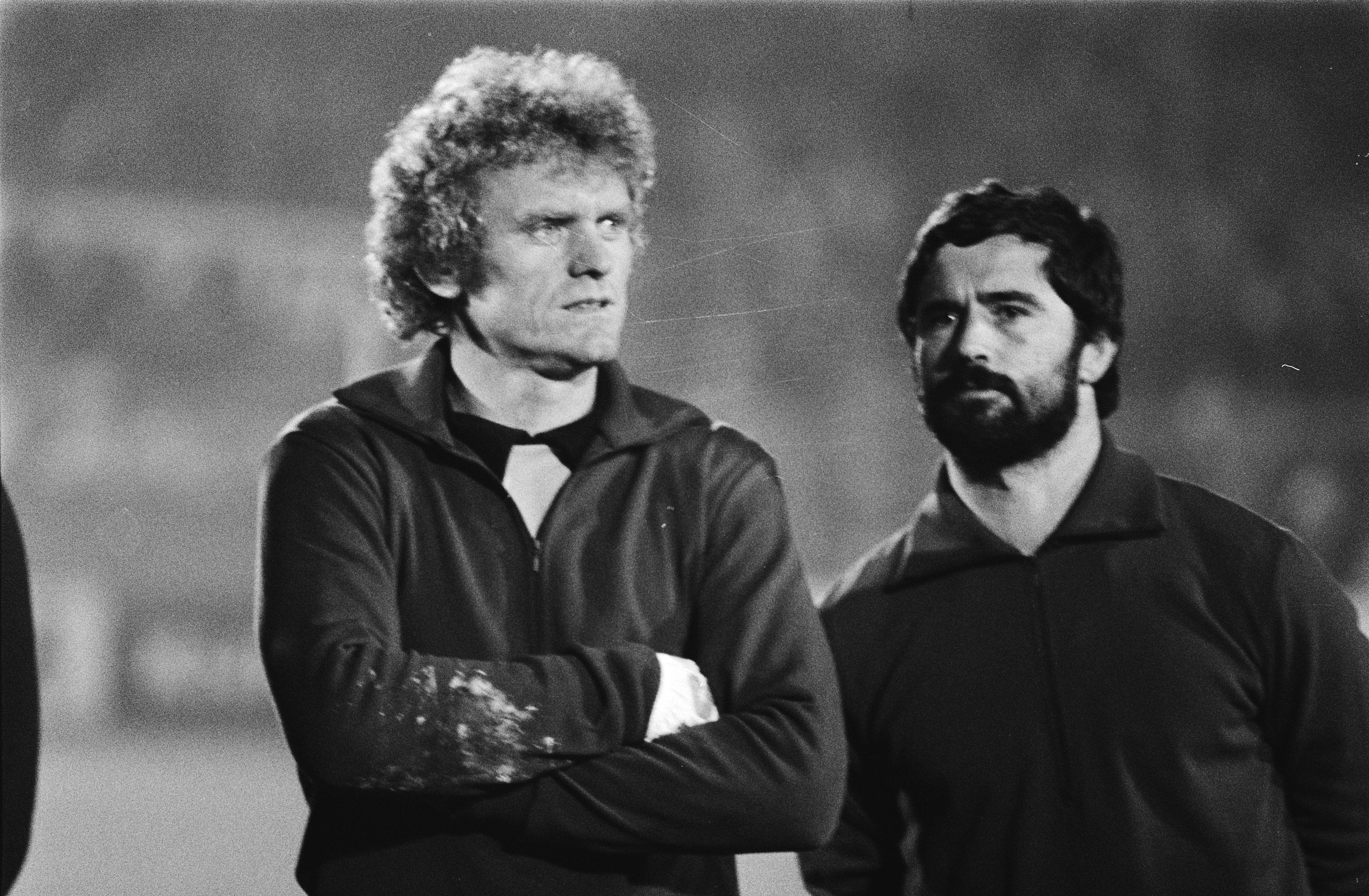 Collectie / Archief : Fotocollectie Anefo Reportage / Serie : [ onbekend ] Beschrijving : Afscheidswedstrijd Johan Cruijff , Ajax tegen Bayern Munchen 0-8; Sepp Maier (l) en Gerd Muller (koppen) Datum : 7 november 1978 Trefwoorden : afscheid, sport, voetbal Persoonsnaam : Bayern Munchen, Cruijff, Johan, Gerd Muller Fotograaf : Suyk, Koen / Anefo Auteursrechthebbende : Nationaal Archief Materiaalsoort : Negatief (zwart/wit) Nummer archiefinventaris : bekijk toegang 2.24.01.05 Bestanddeelnummer : 929-9831